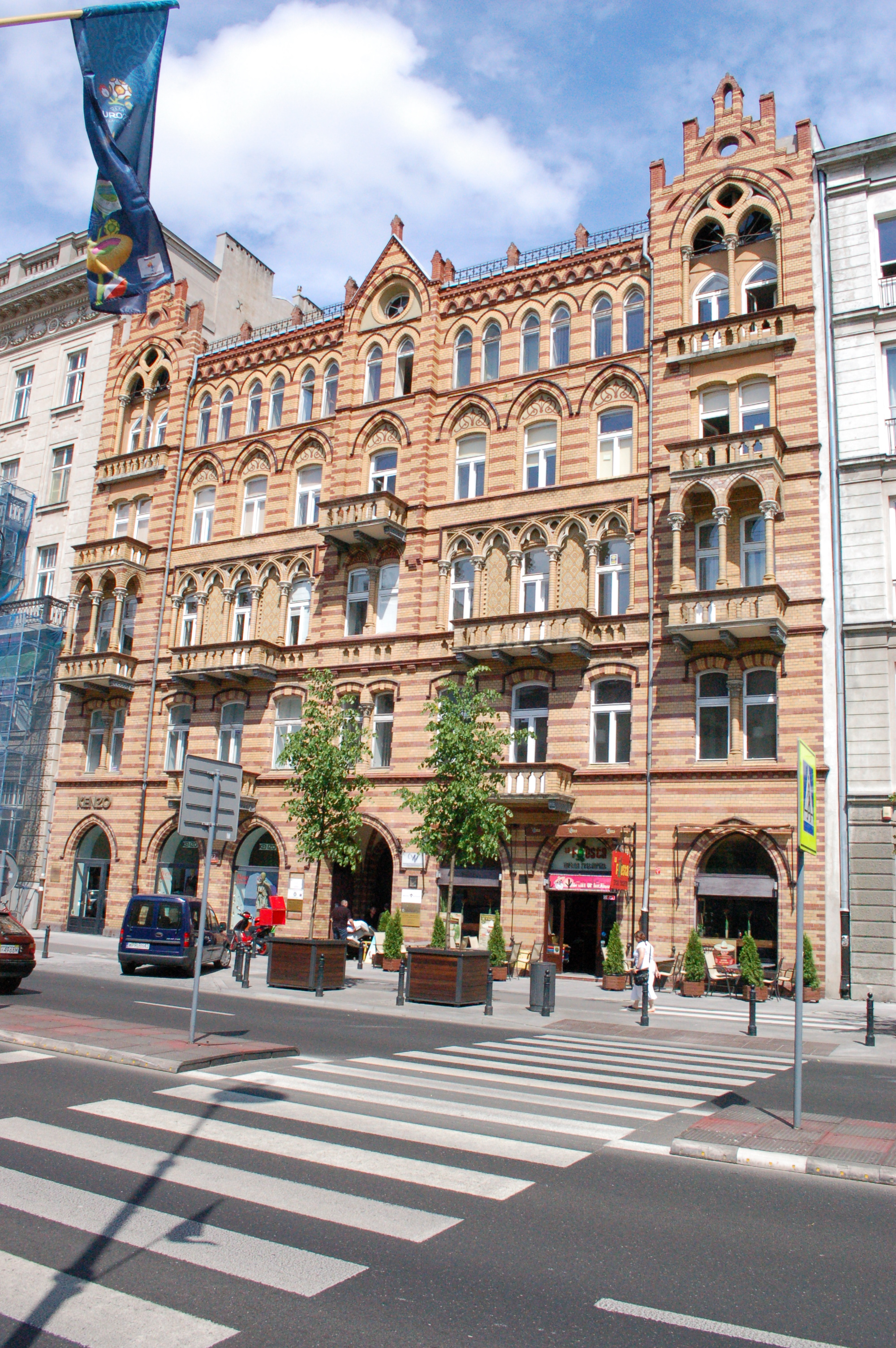 Warschau, das Mietshaus von Władysław Ławrynowicz, auch Porter-Gebäude genannt